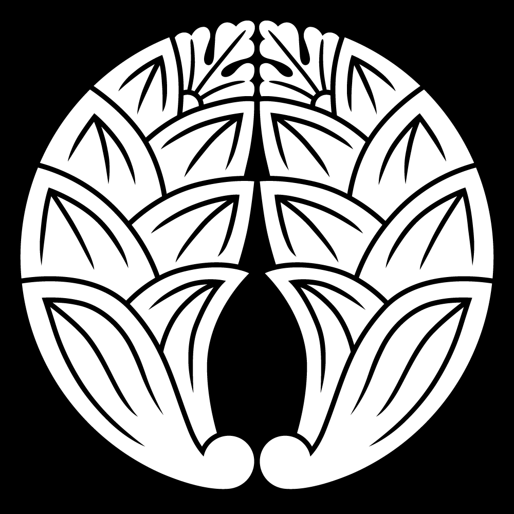 茗荷紋種の一つ、家紋「抱き茗荷」。定番家紋の一つ。